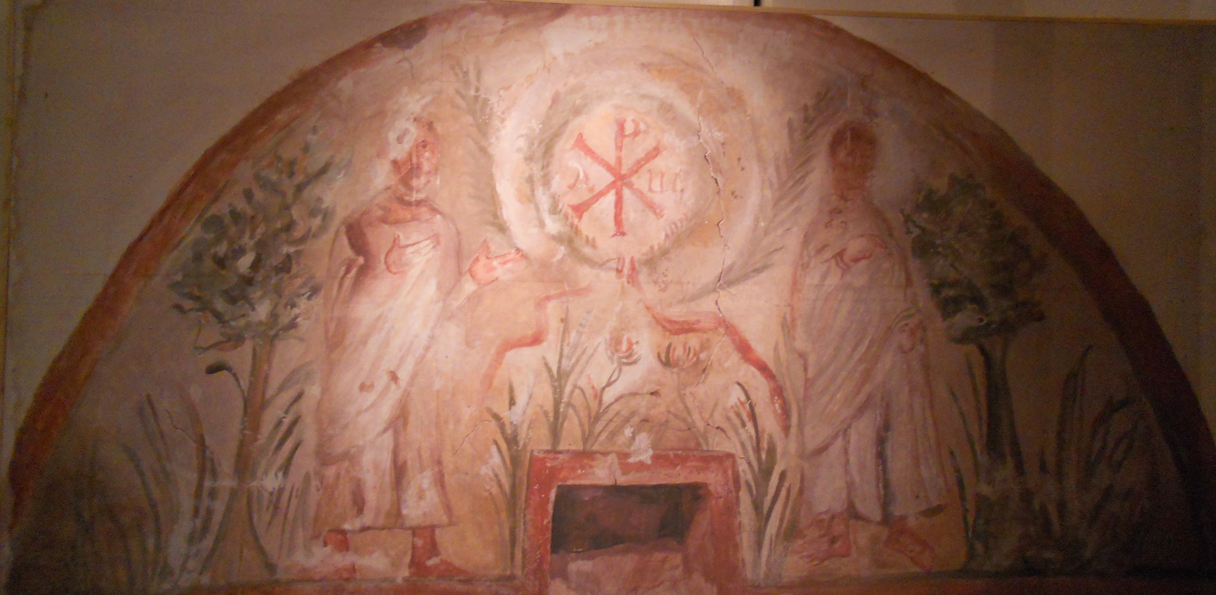 Српски (ћирилица): Репродукција фреске (са Христовим монограмом) у Нишкој ранохришћанској некрополи,добро знаној захваљујући гробници бр. 3 са фигуралним представама.